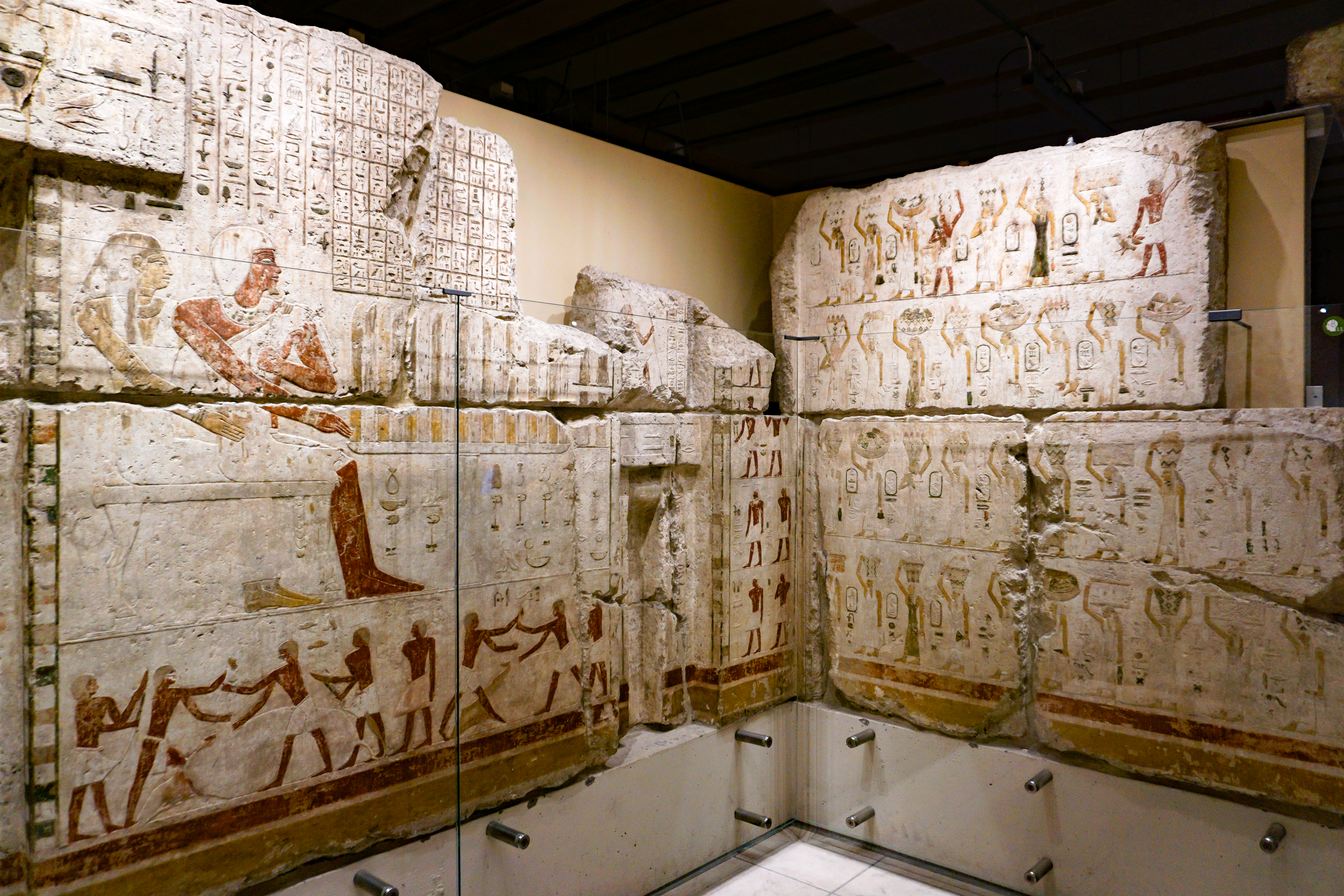 MUT: Museum der Universität Tübingen - Alte Kulturen - Sammlungen im Schloss Hohentübingen, Ägyptische Sammlungen: Opferkammer des Seschemnofer III.